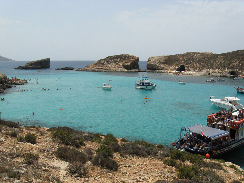 Cominotto 2007 nyarán / Cominotto in summer of 2007